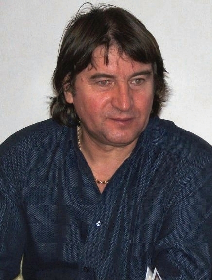 A. Gyuris